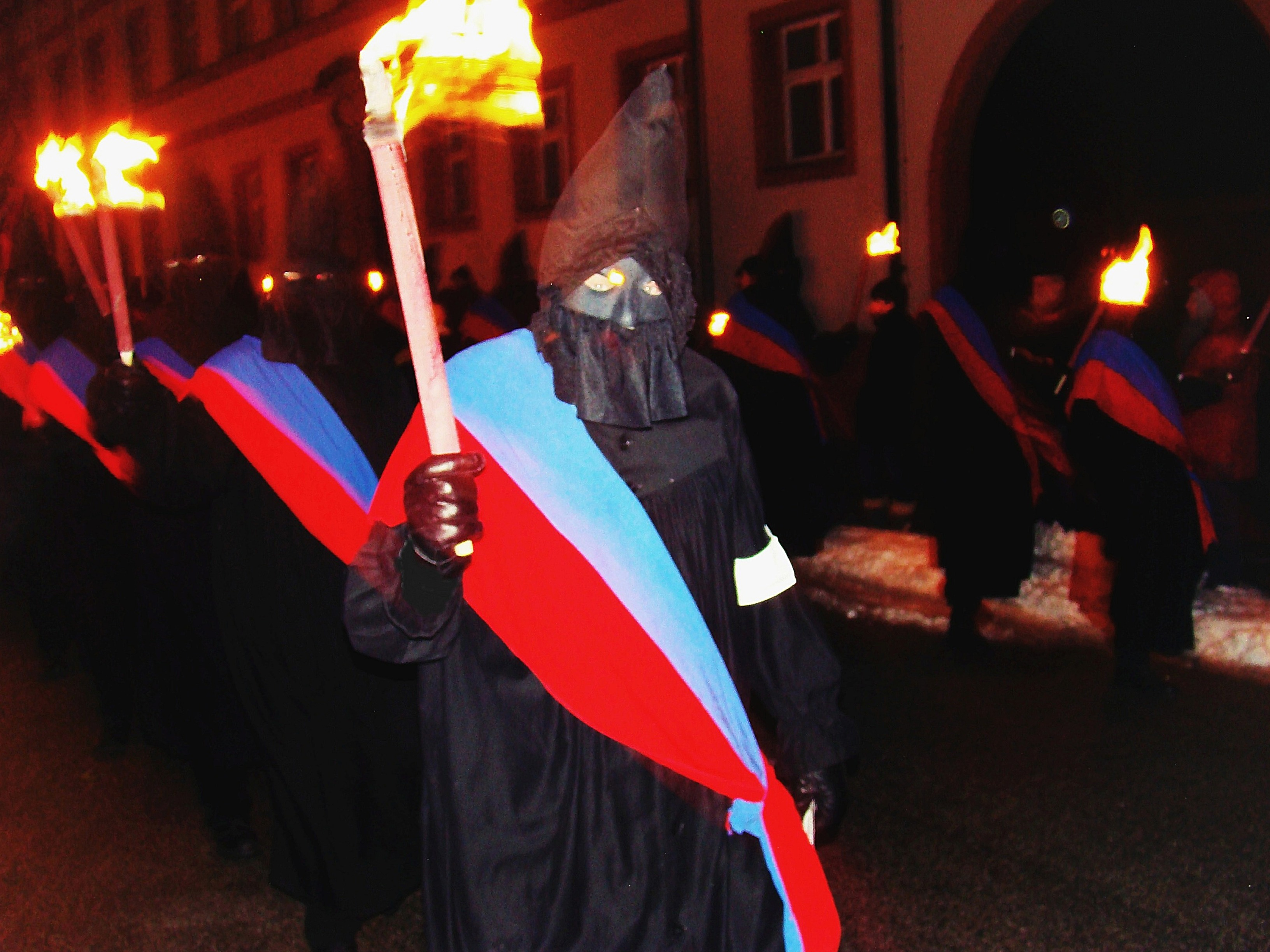 Der Pennäler Schnitzelbank beim Einzug in die Stadt Ellwangen